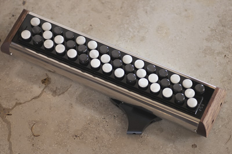 Accordina Modell Havane 2 von Joseph Carrel